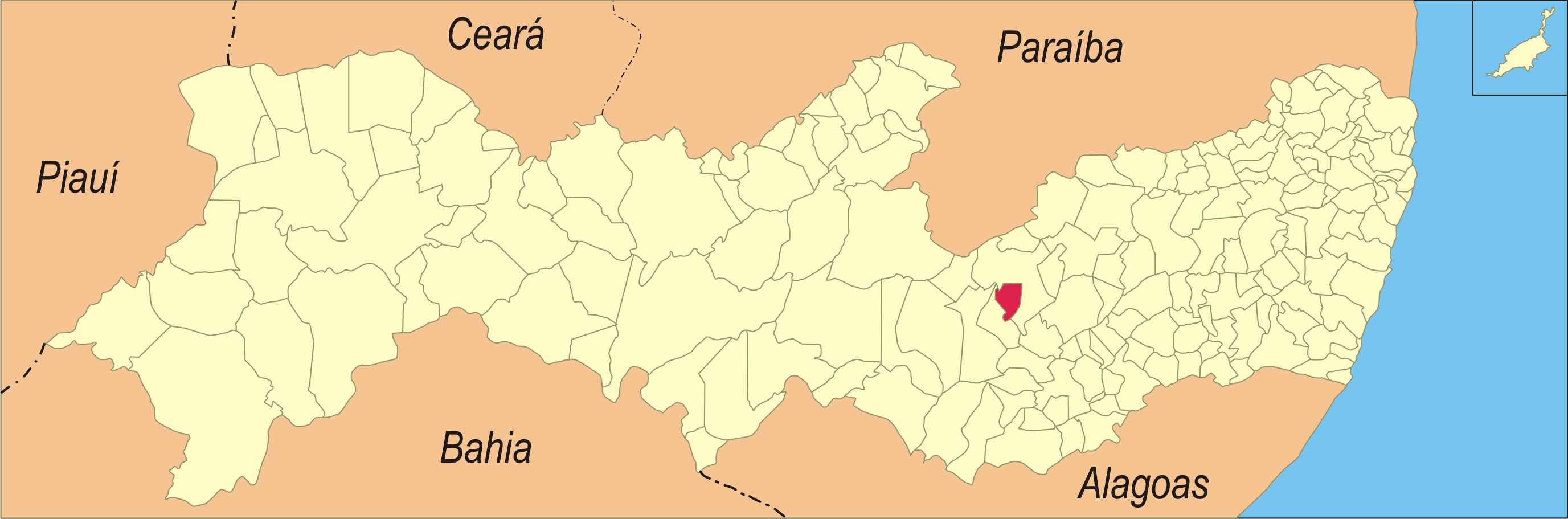 Localização da cidade no estado de Pernambuco